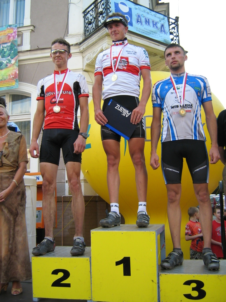 Mistrzostwa Polski MTB 2007 - kat. orlik 1. Dariusz Batek (Halls), 2. Jacek Trzop (Adventure Asepta Kenda Łódź), 3. Kryspin Pyrgies (MTB Silesia Rybnik)